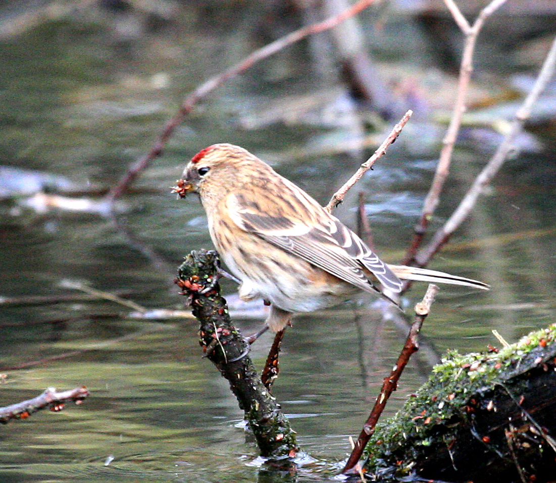 Lesser Redpoll (Carduelis cabaret)